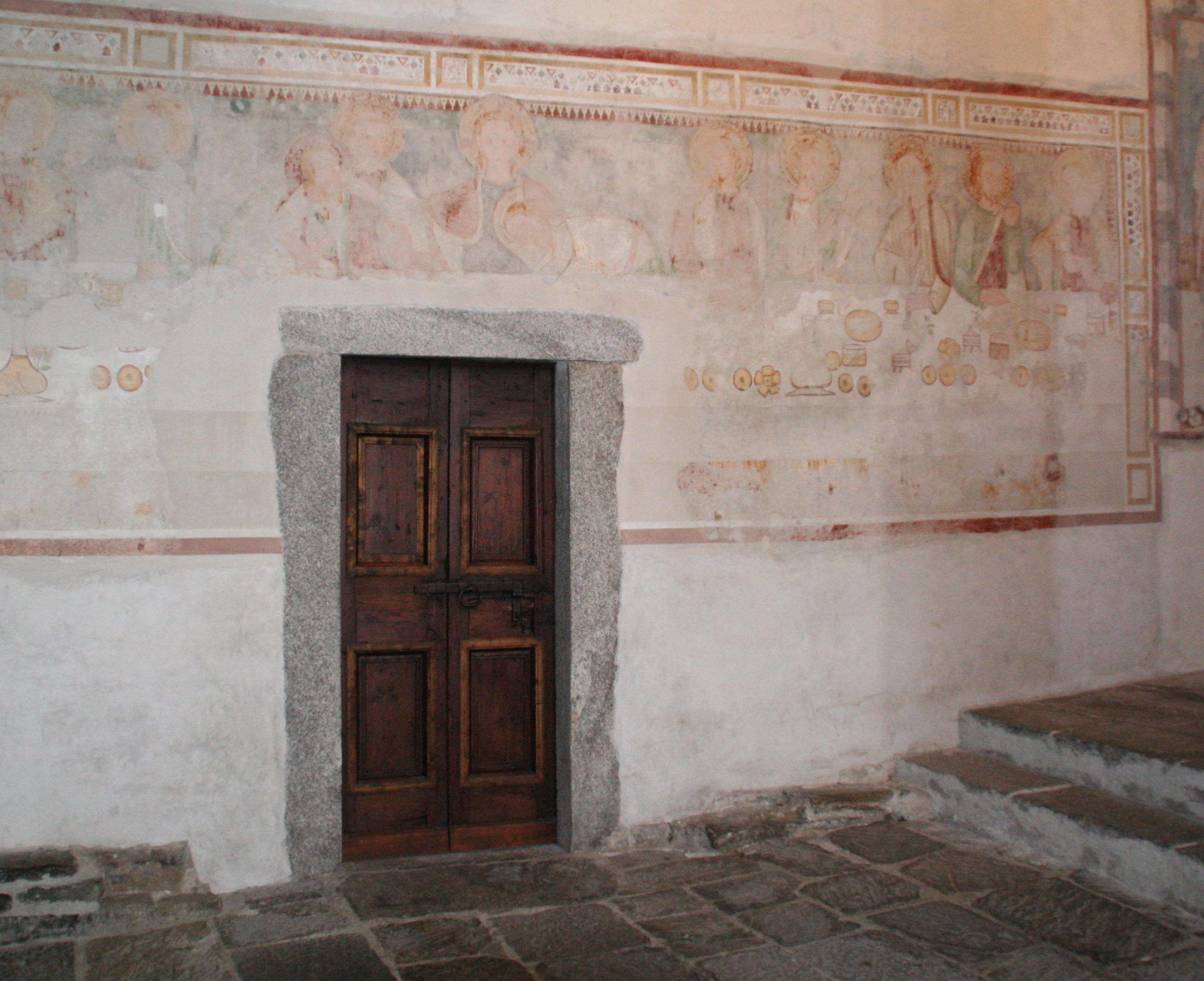 Kirche San Pietro e Paolo (Biasca) Abendmahl an der Nordseite